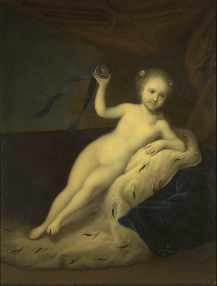 Будущая императрица Елизавета Петровна, дочь Петра I и Екатерины I, изображена обнаженной в образе Флоры (?), лежащей на синей, подбитой горностаем мантии — знак принадлежности к императорской семье. В правой руке она держит миниатюру с портретом отца - Петра I, к рамке которой прикреплена Андреевская синяя лента. Архитектурный фон составляет нейтральная коричневая драпировка с правой стороны. Есть нечто пикантное в том, что ребенку приданы формы взрослой женщины. Но в это время по законам портретописи детей изображали как взрослых.